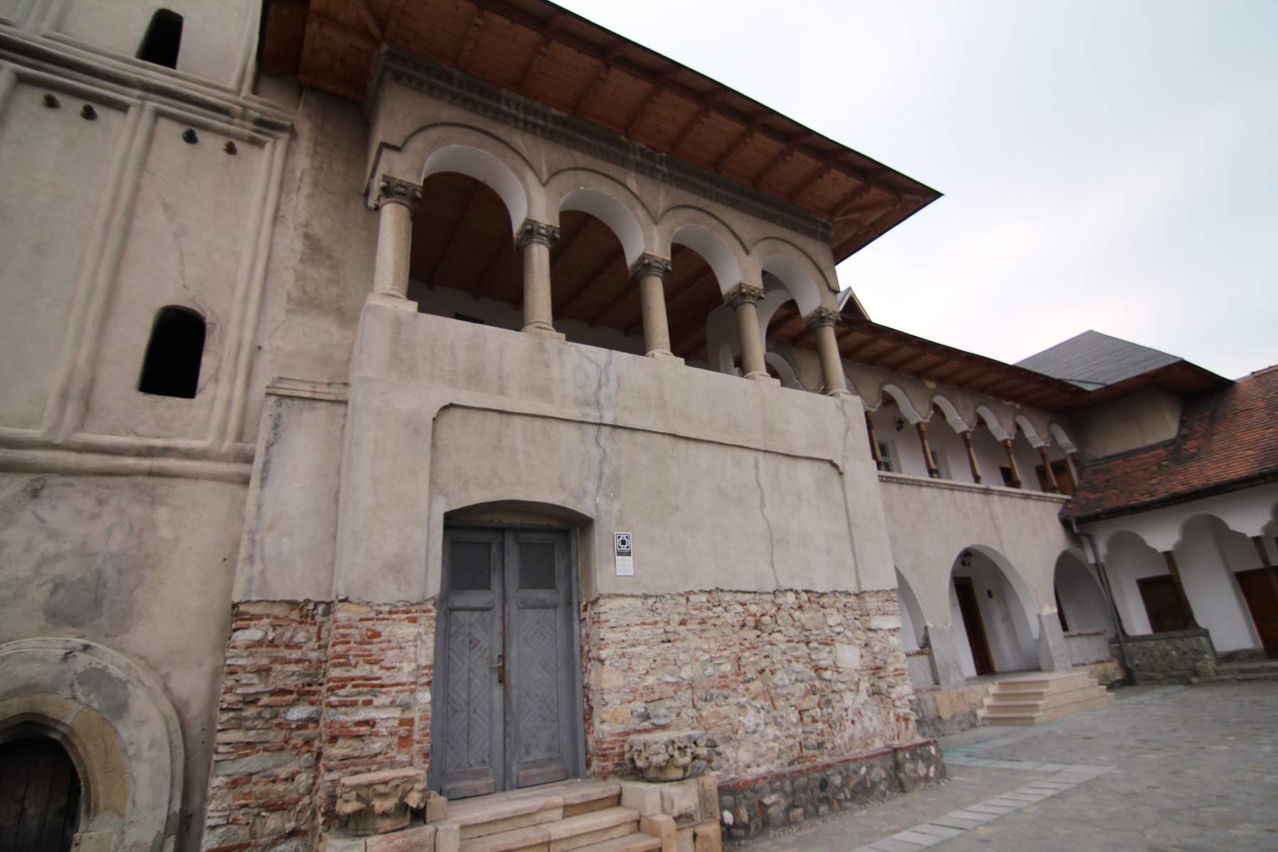 Casa egumenească la Negru Vodă 03